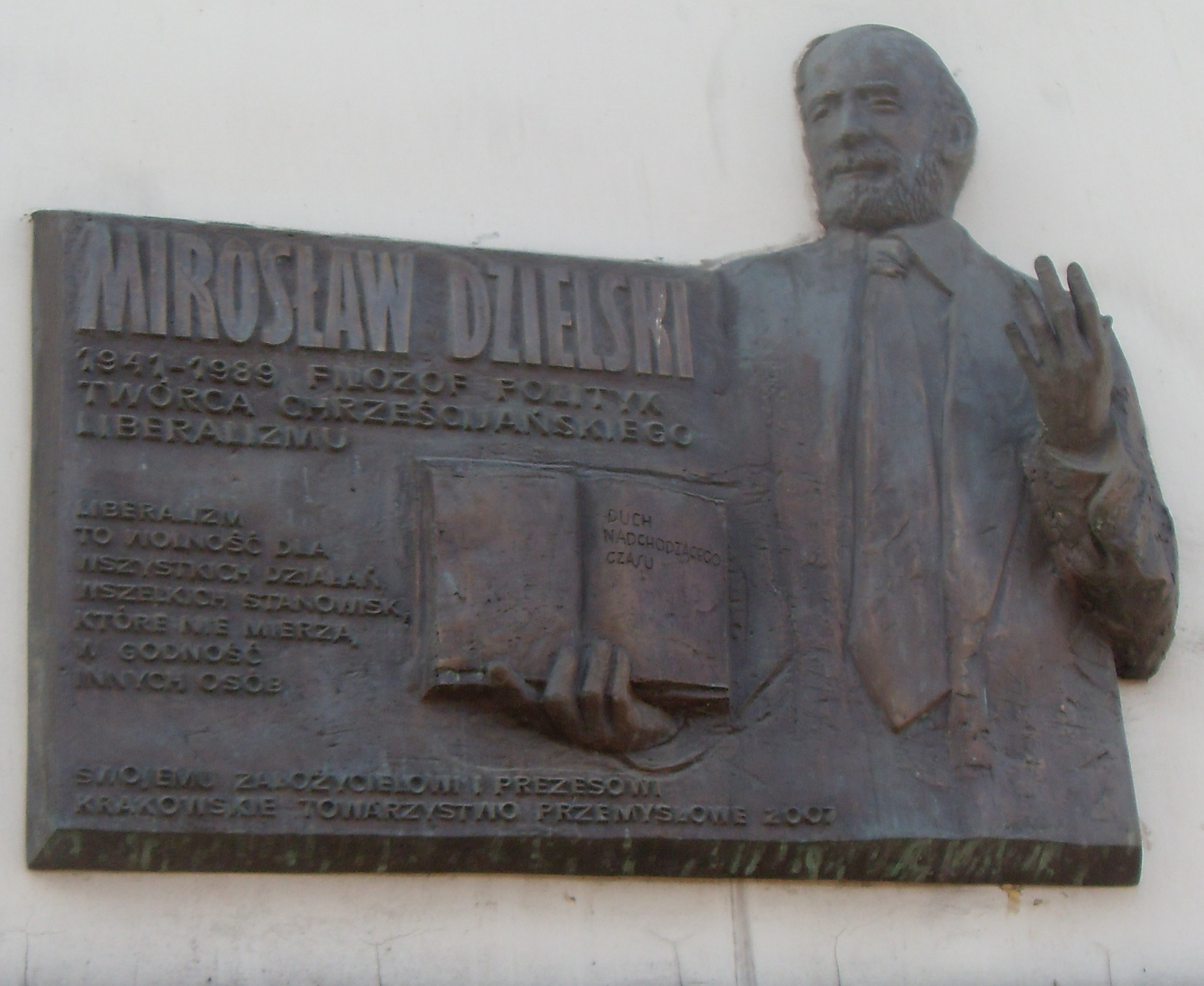 Tablica pamiątkowa ku czci Mirosława Dzielskiego na gmachu "Herbewo" w Krakowie, al. Słowackiego 64.